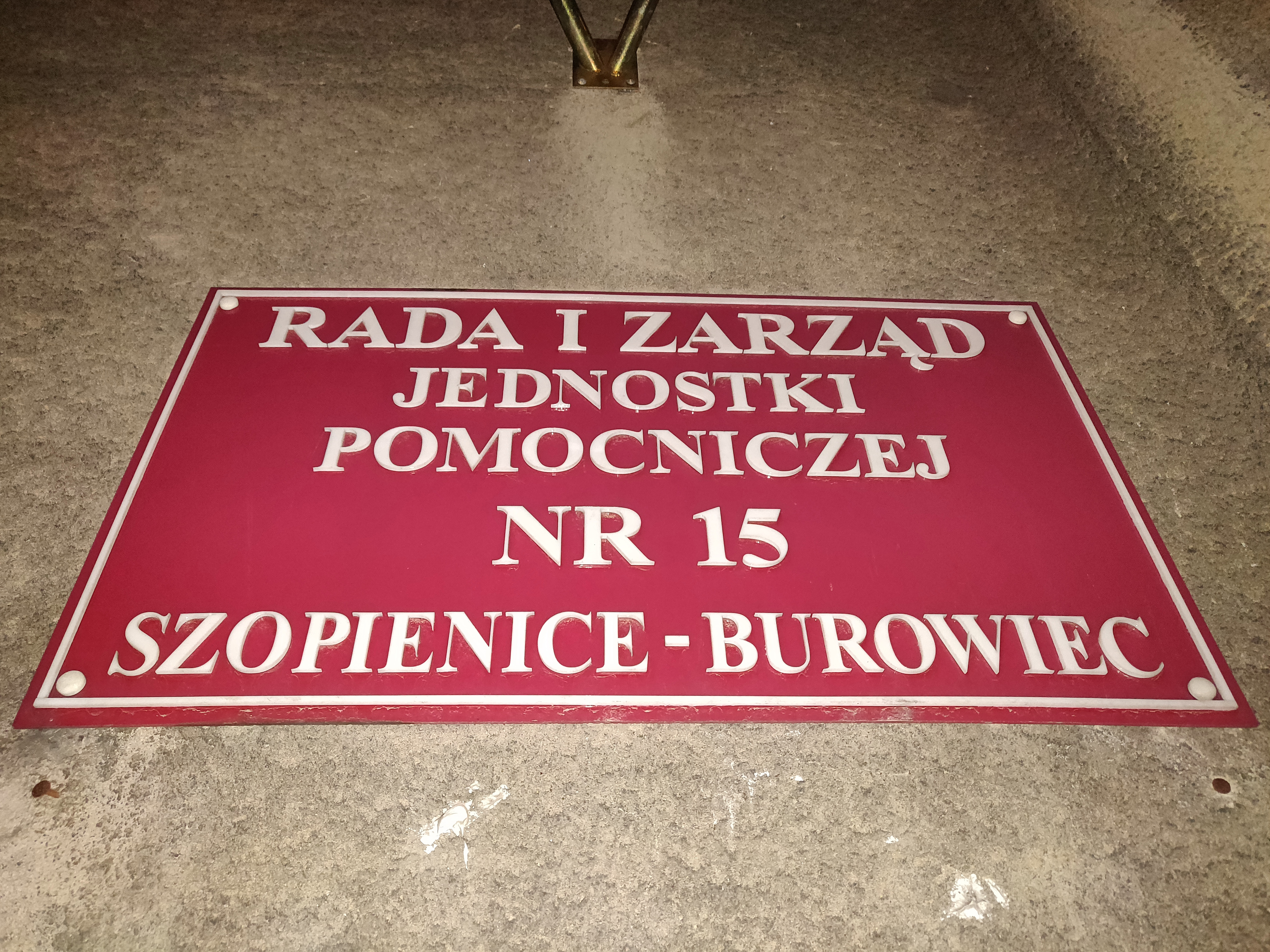 Tablica "Rada i Zarząd Jednostki Pomocniczej nr 15 Szopienice-Burowiec" na budynku przy ul. Wiosny Ludów 24 w Katowicach-Szopienicach